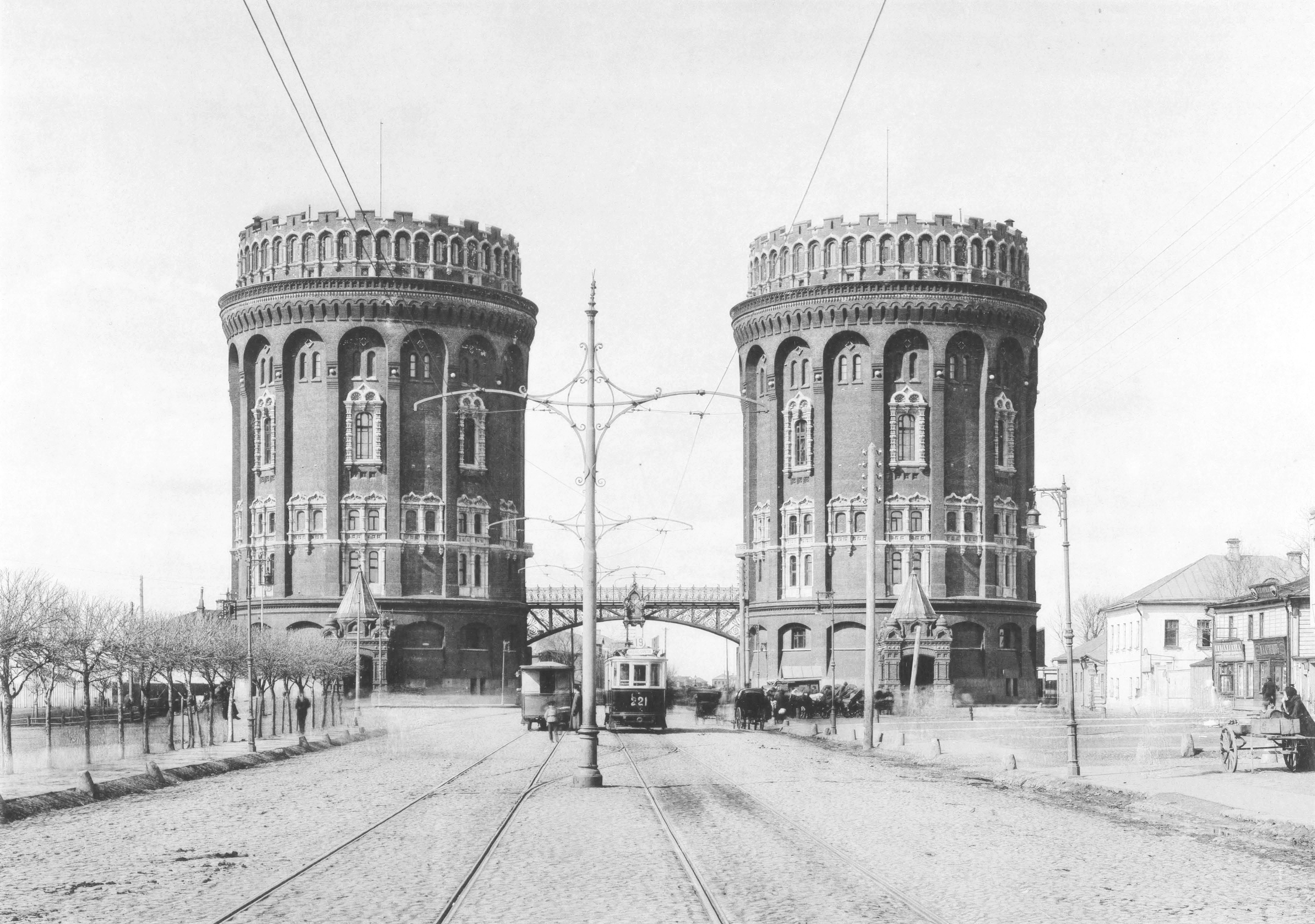 129. Крестовскiя водонапорныя башни у Крестовской заставы.